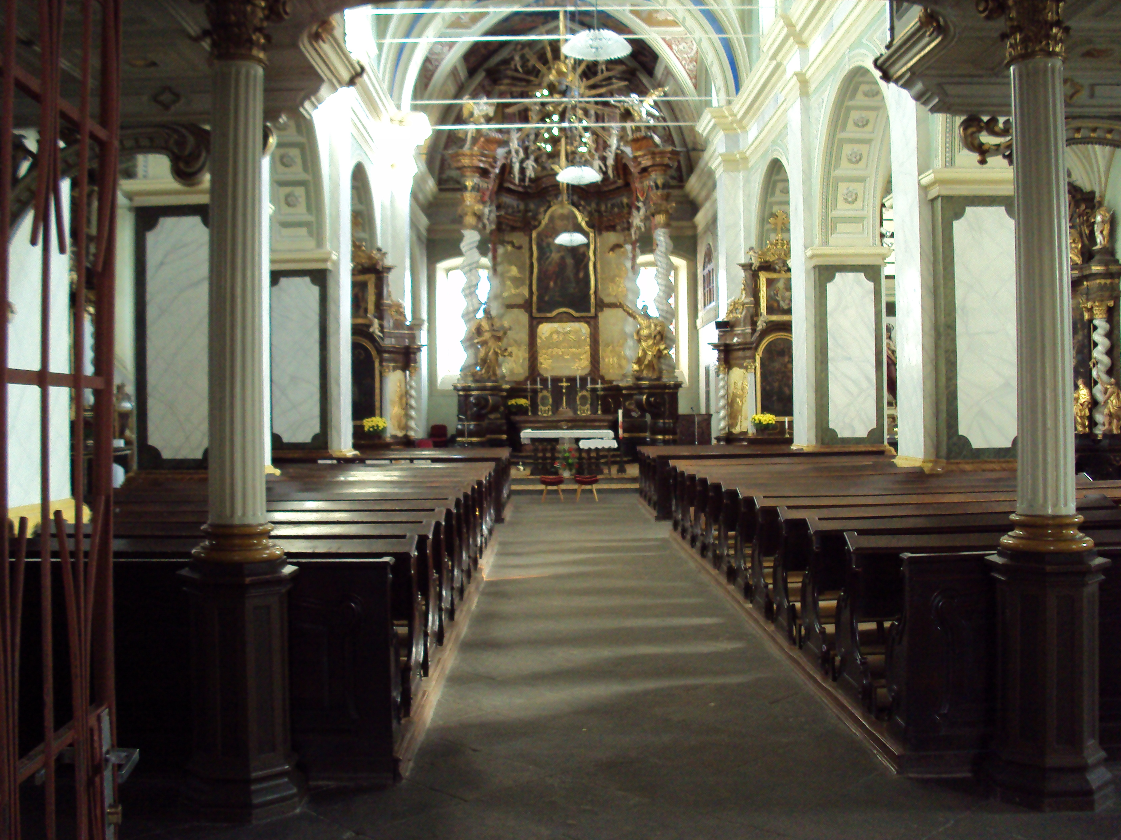 Hlavní oltář kostela sv.Jana Křitele v Teplicích